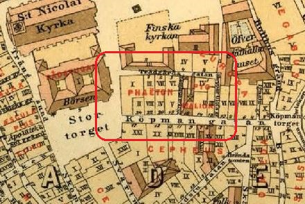 Del av Alfred Rudolf Lundgrens Stockholmskarta visande kvarteren Phaeton och Pygmalion